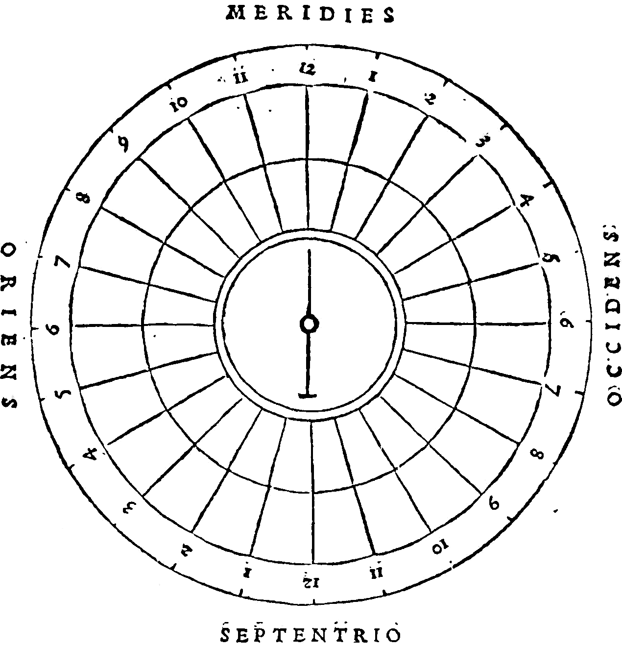 Incisione da De re metallica di Georg Agricola, Basilea, 1556